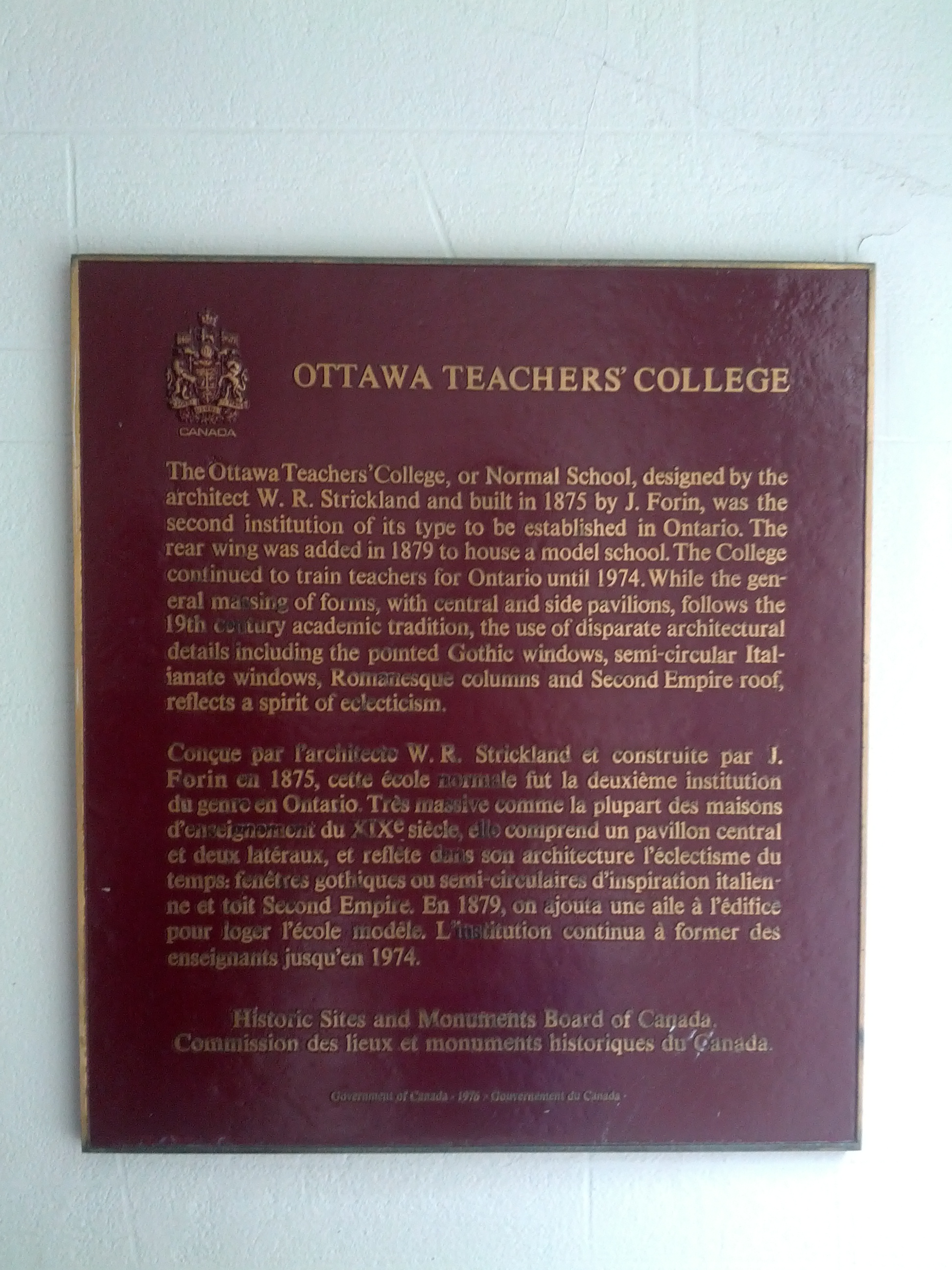 Placa perto da prefeitura de Ottawa.